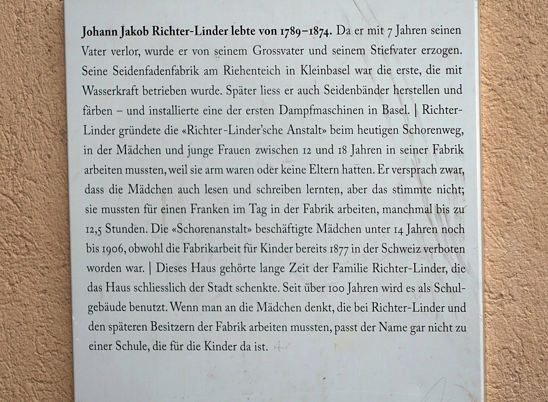 Geschichte zur die «Richter-Linder’sche Anstalt» am Claragraben 38 Basel